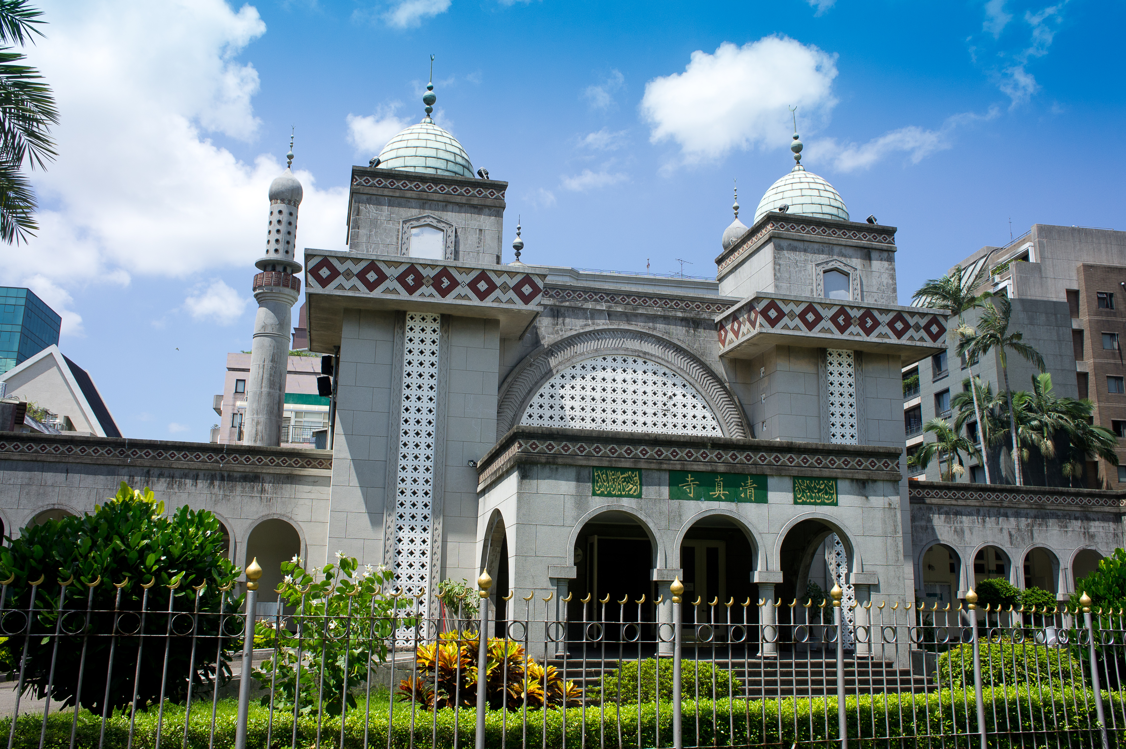 雖說伊斯蘭教在台灣是占少數，但信徒在台灣仍可受到安全的信仰空間，尤其是以台北清真寺（或稱台北清真大寺），是伊斯蘭教於台灣最著名且重要的禮拜場所。